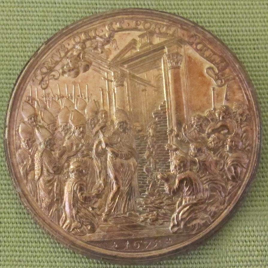 Giovanni hamerani, clemente X apre la porta santa, 1675